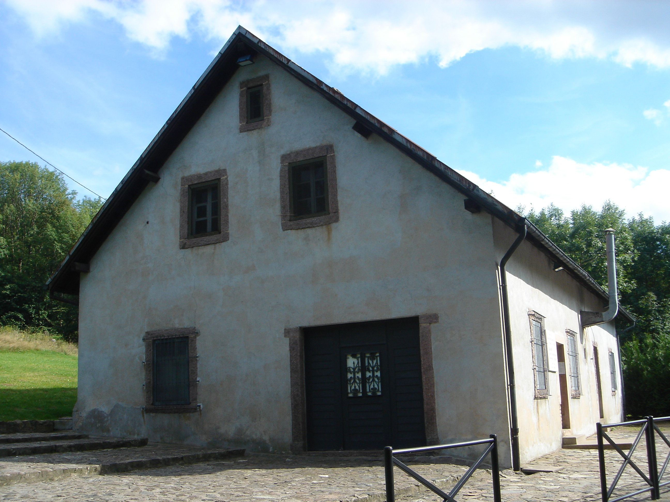 La chambre à gaz située à 2 kilomètres en contrebas du camp. Photographe : Vincent Ricci.